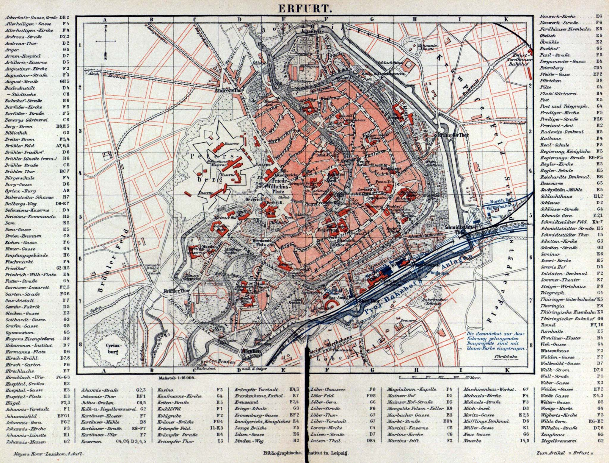 Stadtplan von Erfurt (1 : 16 000) mit Straßenverzeichnis